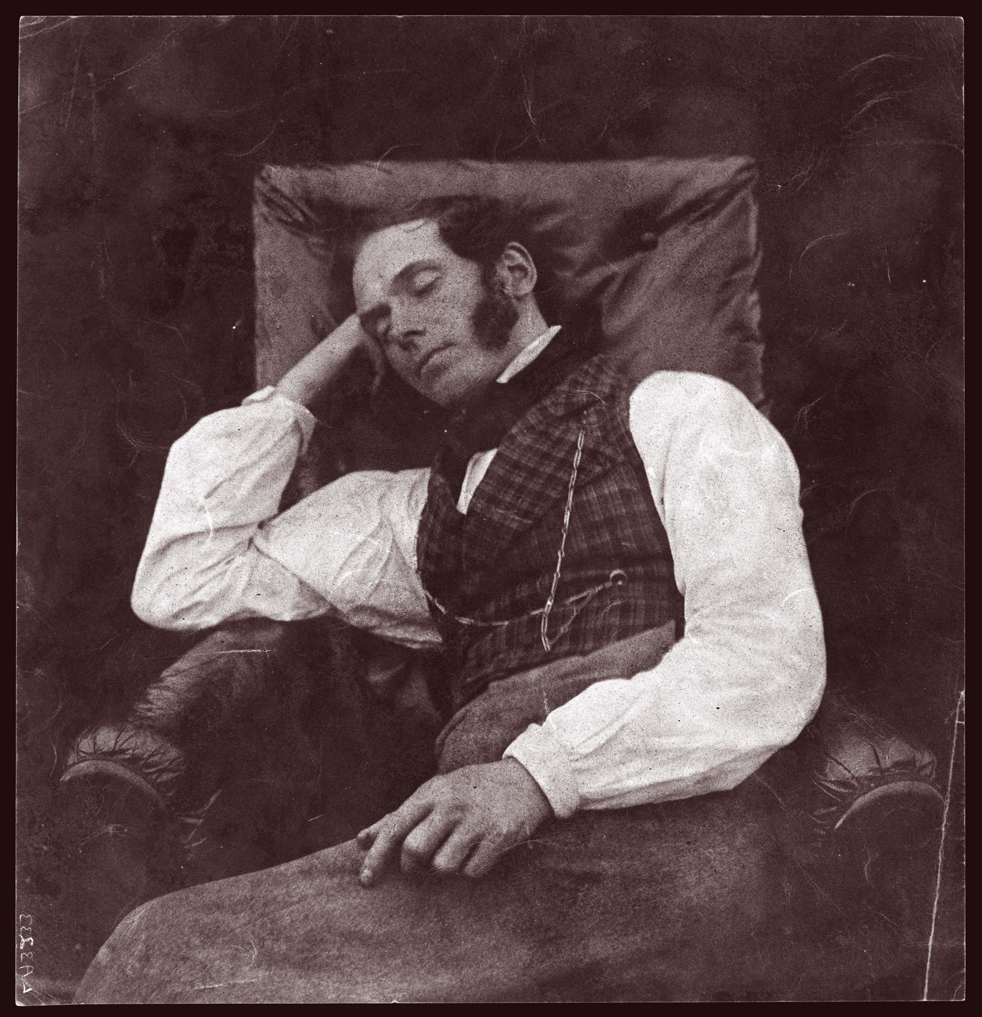 William Henry Fox Talbot (1800-1877). Nicolaas Henneman Asleep, 1844-1845